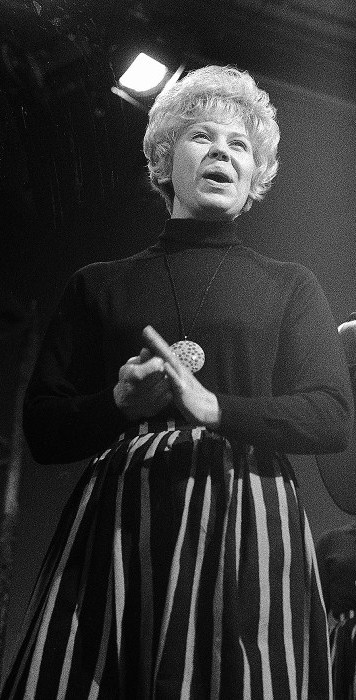 Suomalainen iskelmälaulaja Brita Koivunen (1931-2014) vuonna 1965.